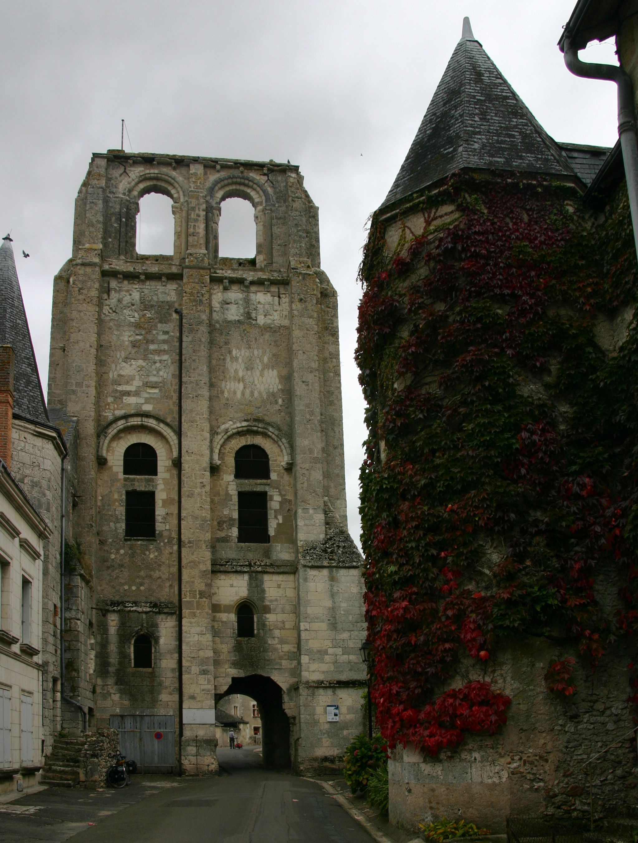 Cormery